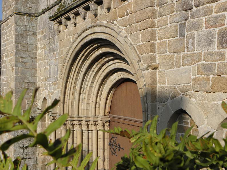 Détail du portail de l'abbatiale Saint-Magloire de Léhon (22).